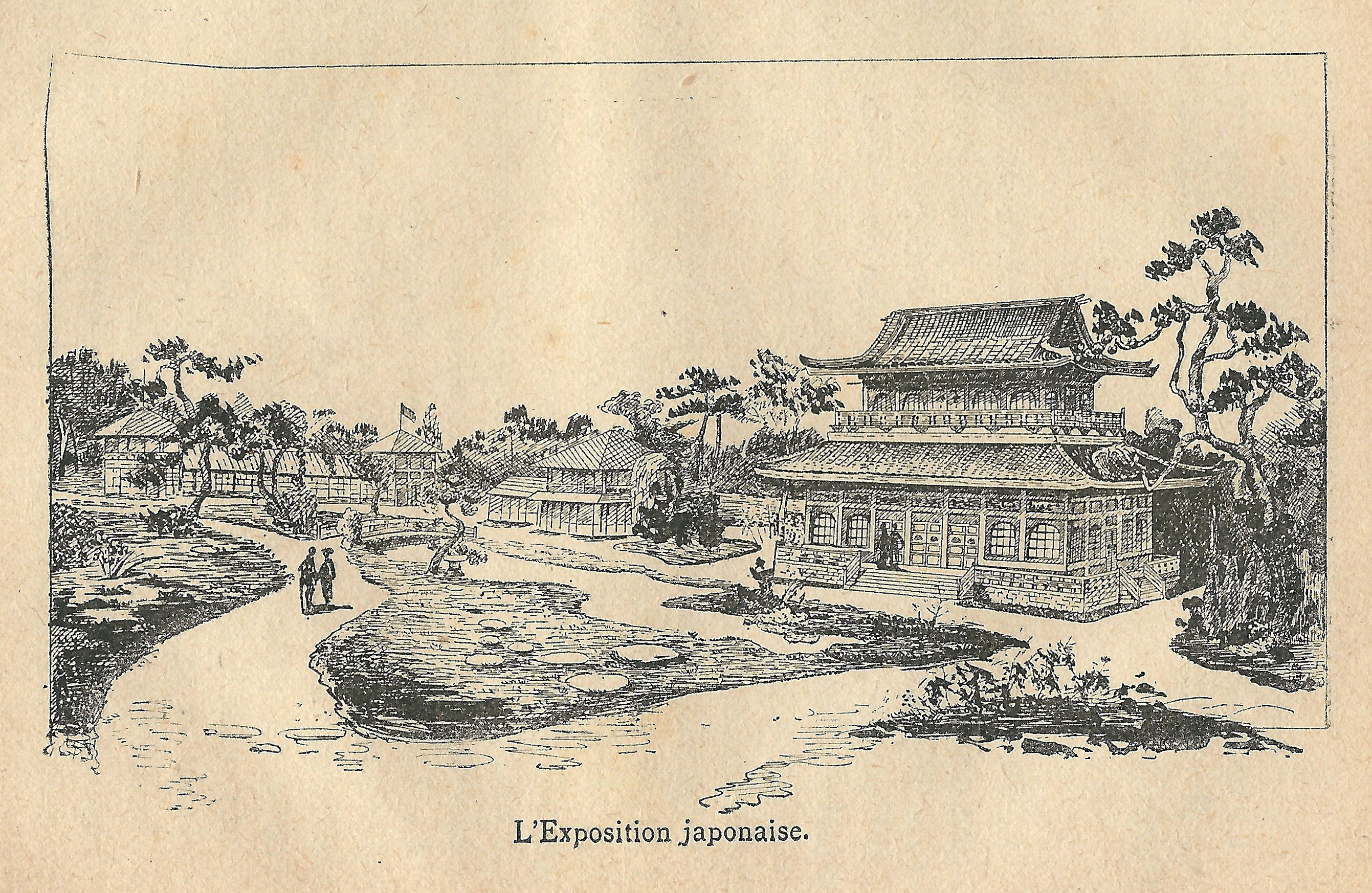 Une des illustrations du Guide remboursable de l'Expo 1900